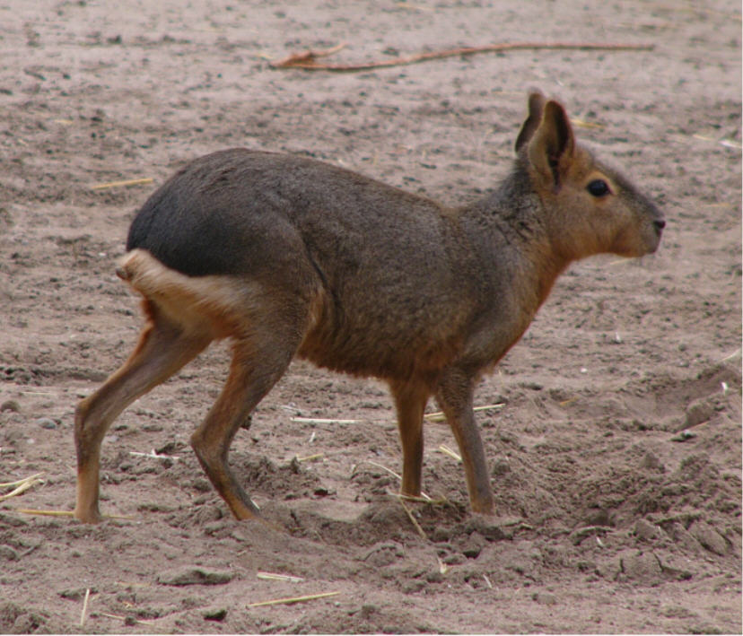 Das Foto zeigt einen großen Pampashasen (Mara) des Darmstädter Vivariums.